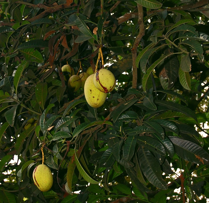 Mangifera foetida, fruiting branch. Pandeglang, Banten (west Java), Indonesia